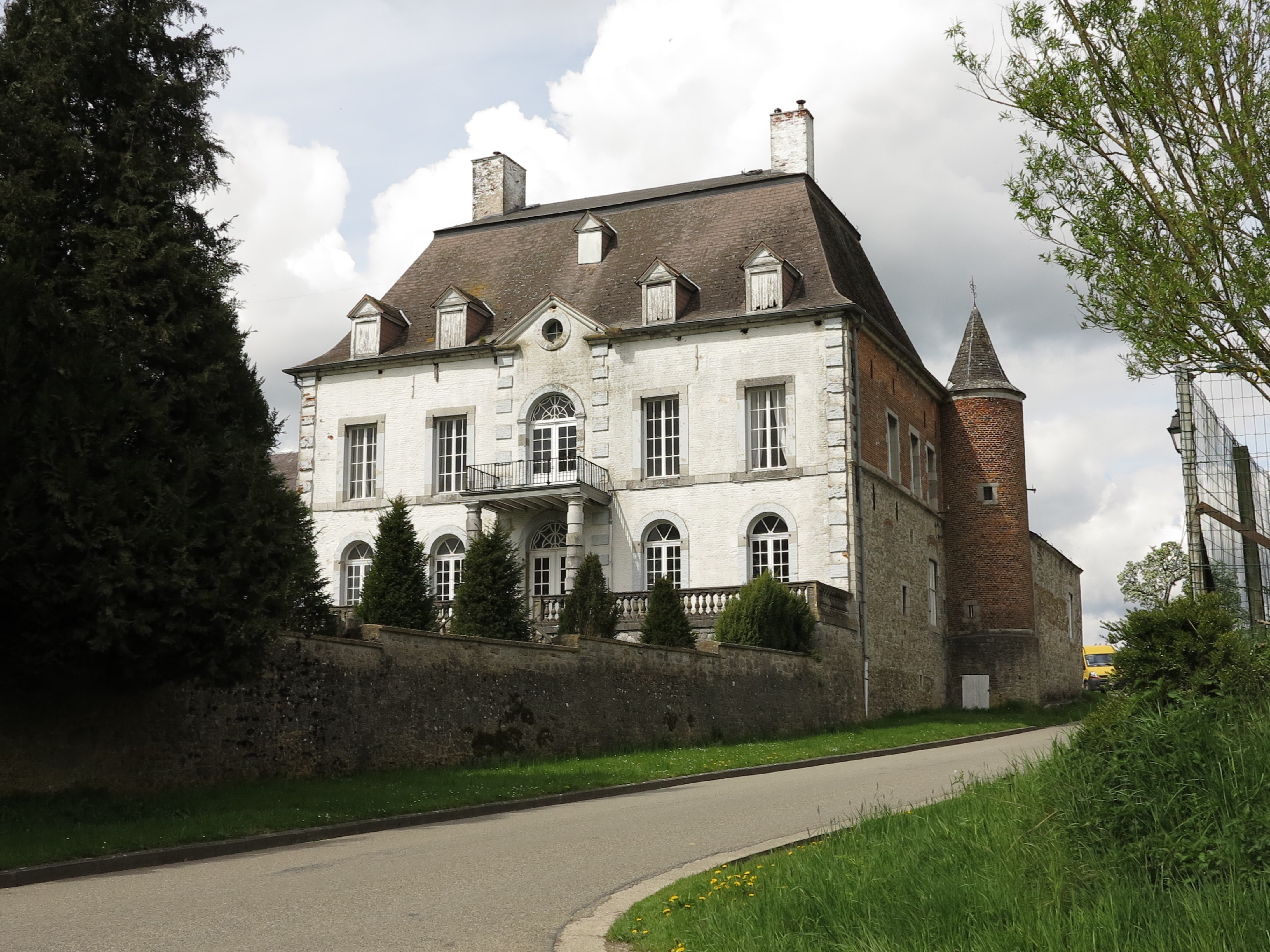 Vooraanzicht van de kasteelboerderij van Vergnies